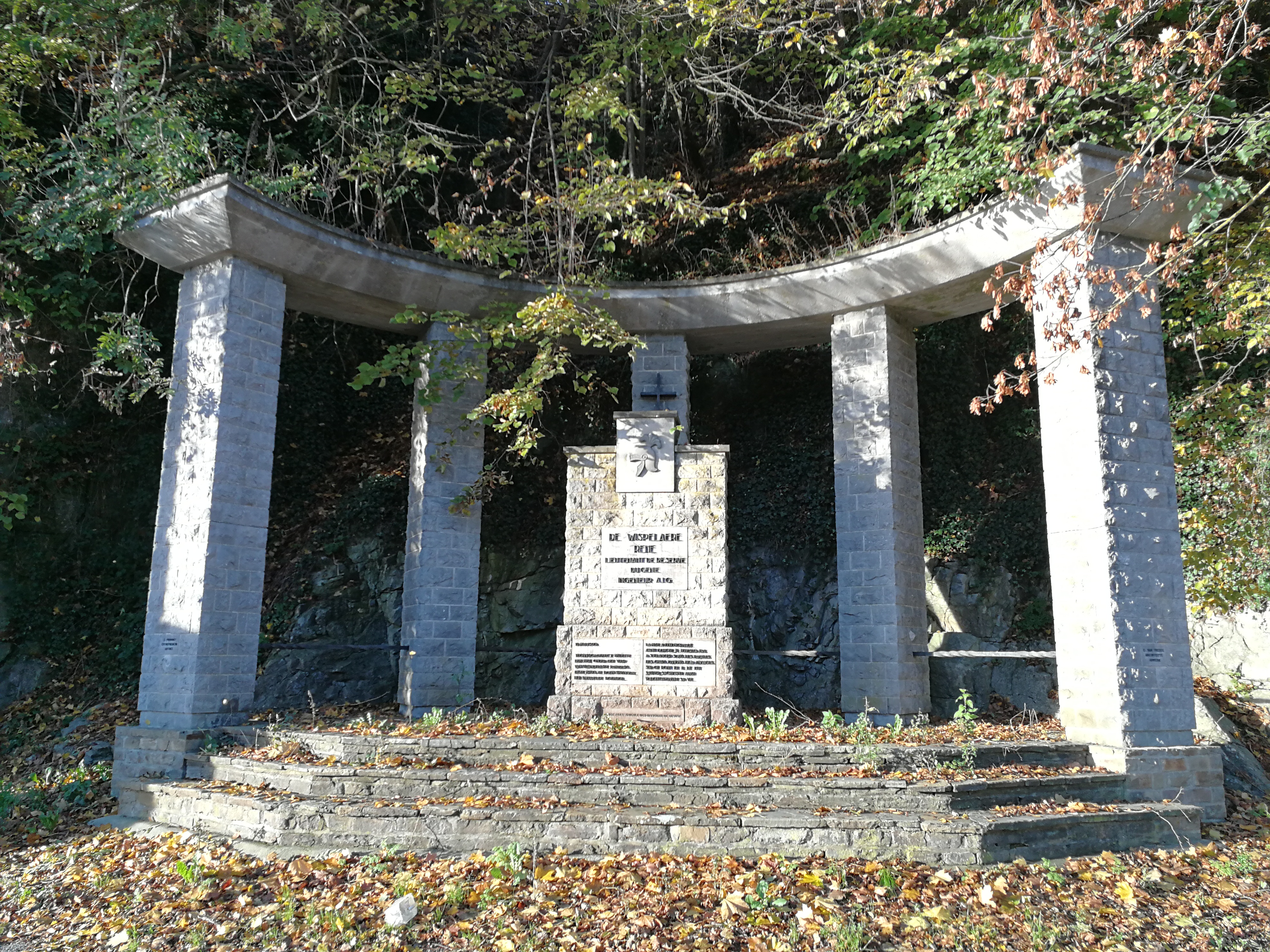 Mémorial en l'honneur du lieutenant de réserve René De Wispelaere, qui a fait sauter le pont au sacrifice de sa vie à l'arrivé des soldats allemands le 12 mai 1940. Oeuvre par E. Van Treek, Anvers. Erigé par l'amicale des officiers de Dinant. Détail disponible sur une cette photo. This photo of immovable heritage has been taken in the Walloon Region